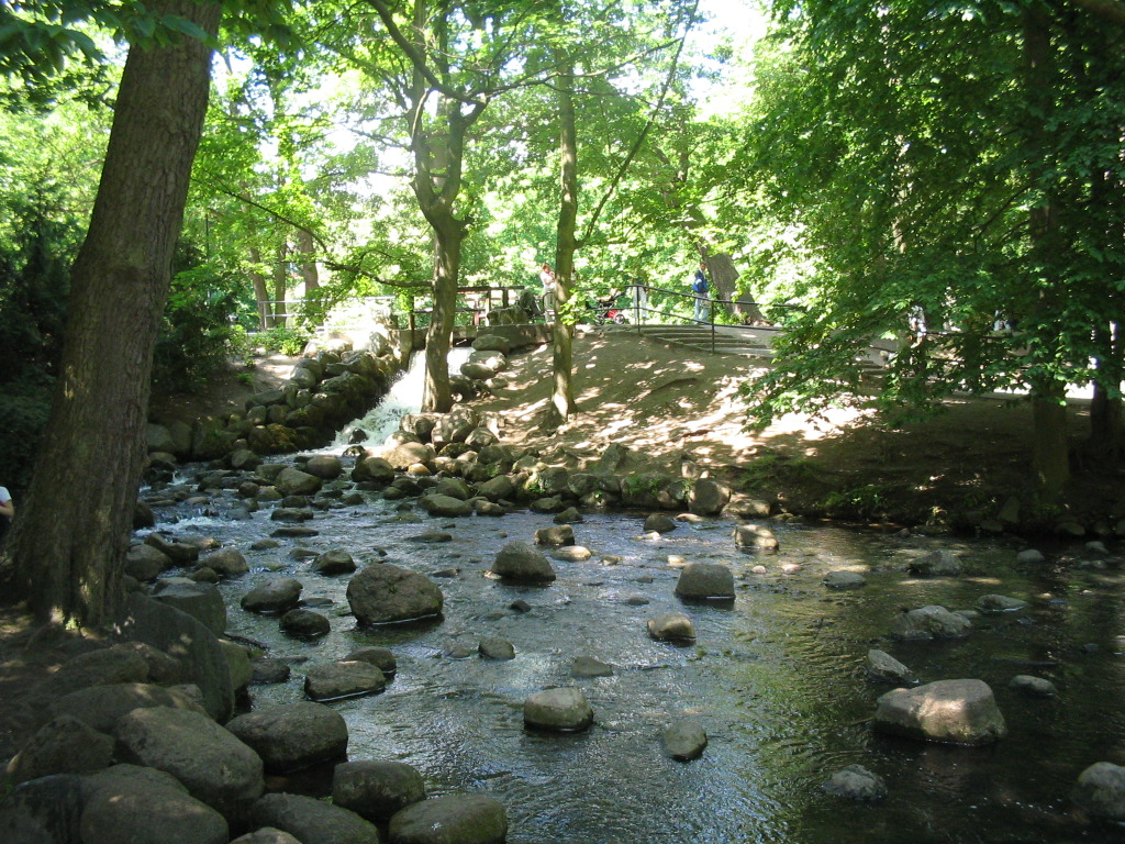 Park Gdansk Oliwa, july 2005, Poland